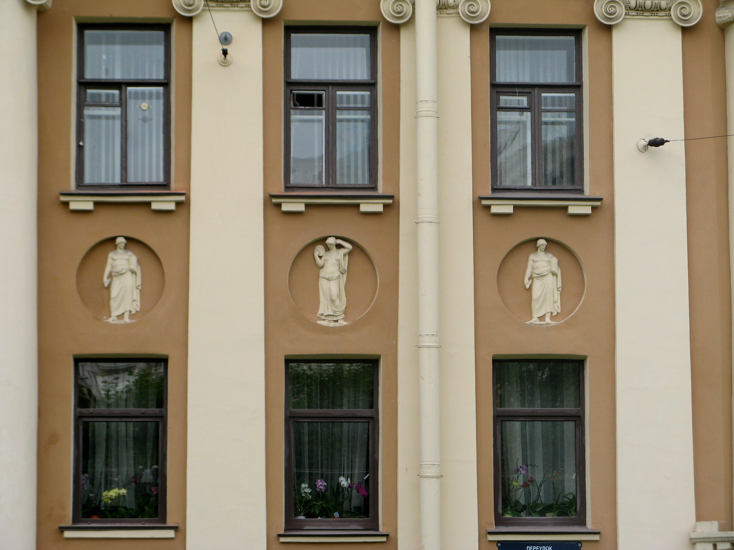 Доходный дом Г.Л. Шалита (акционерного общества 'Новый Петербург'). г. Санкт-Петербург, переулок Каховского, дом 10